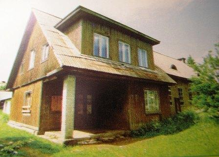 Aruküla vana kultuurimaja. Ehitatud 1939 Aruküla Aedlinna Heakorra Seltsi eestvedamisel. Pilt tehtud 2001. aastal